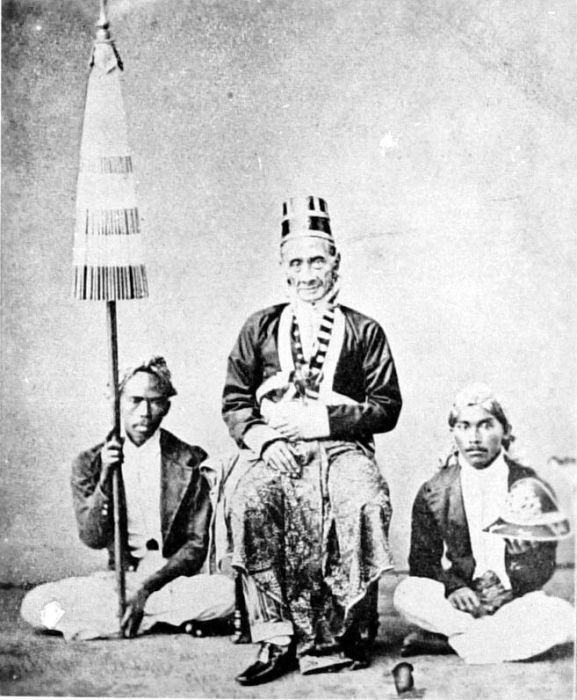 Repronegatief. Raden Adipati Karta Negara, de door Multatuli beschuldigde regent van Lebak, West-Java.